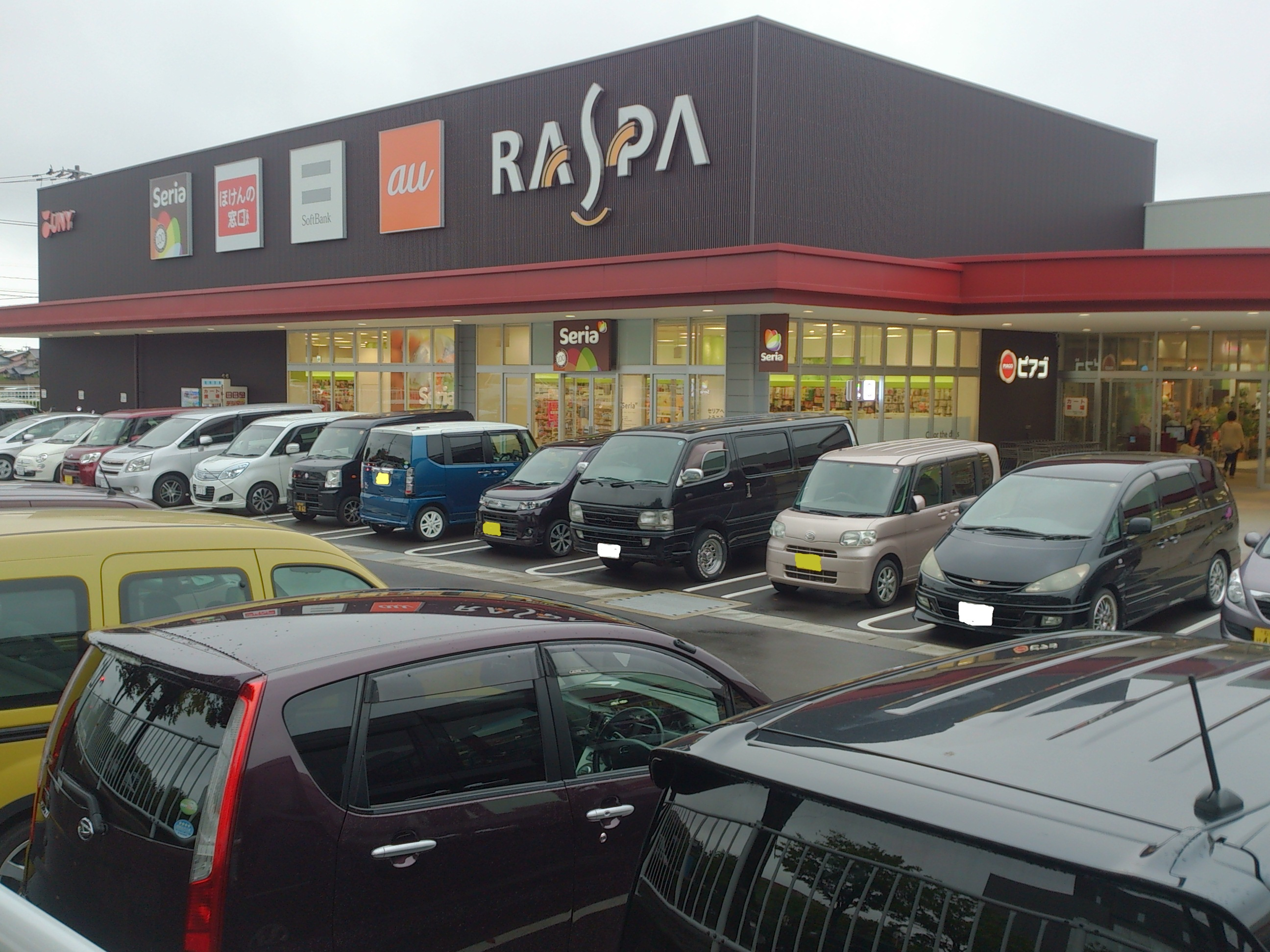 ラスパ白山店舗西側外観（Ａ敷地）